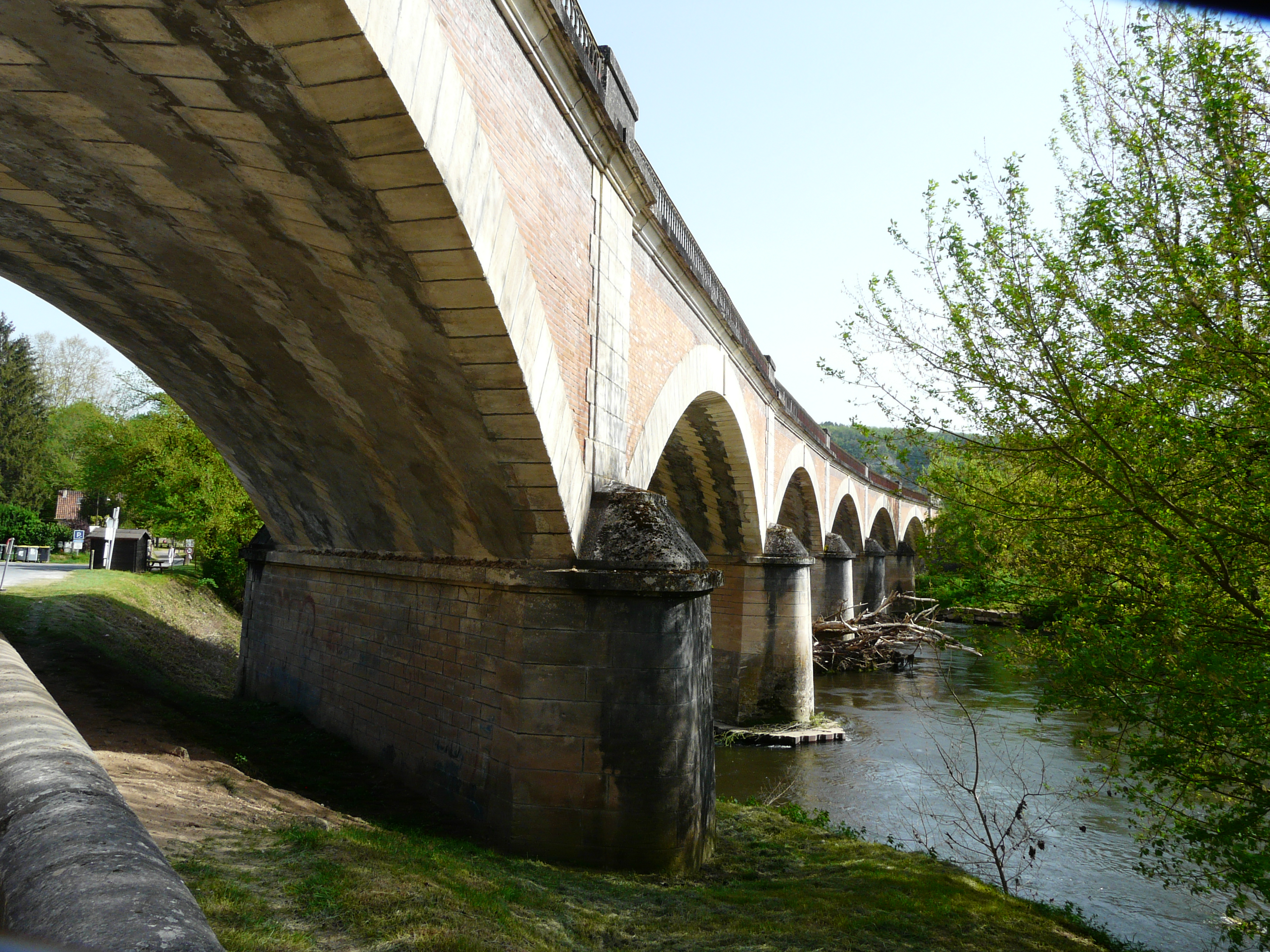 Le viaduc des Eyzies sur la Vézère, Les Eyzies-de-Tayac-Sireuil, Dordogne, France.